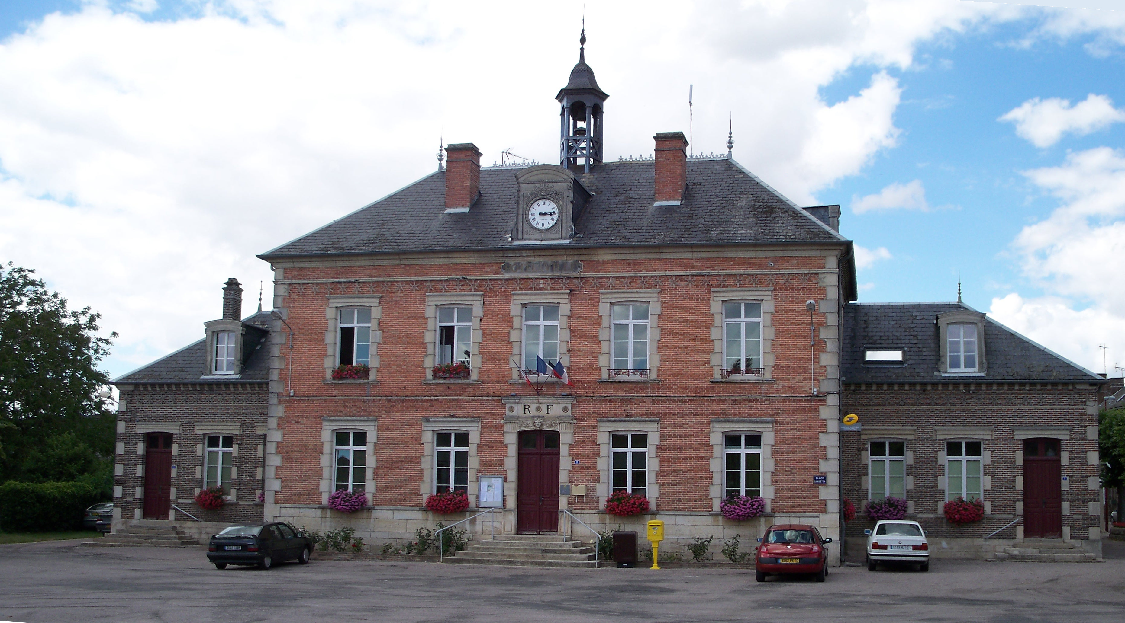 Mairie de Pâlis, dans le département de l'Aube